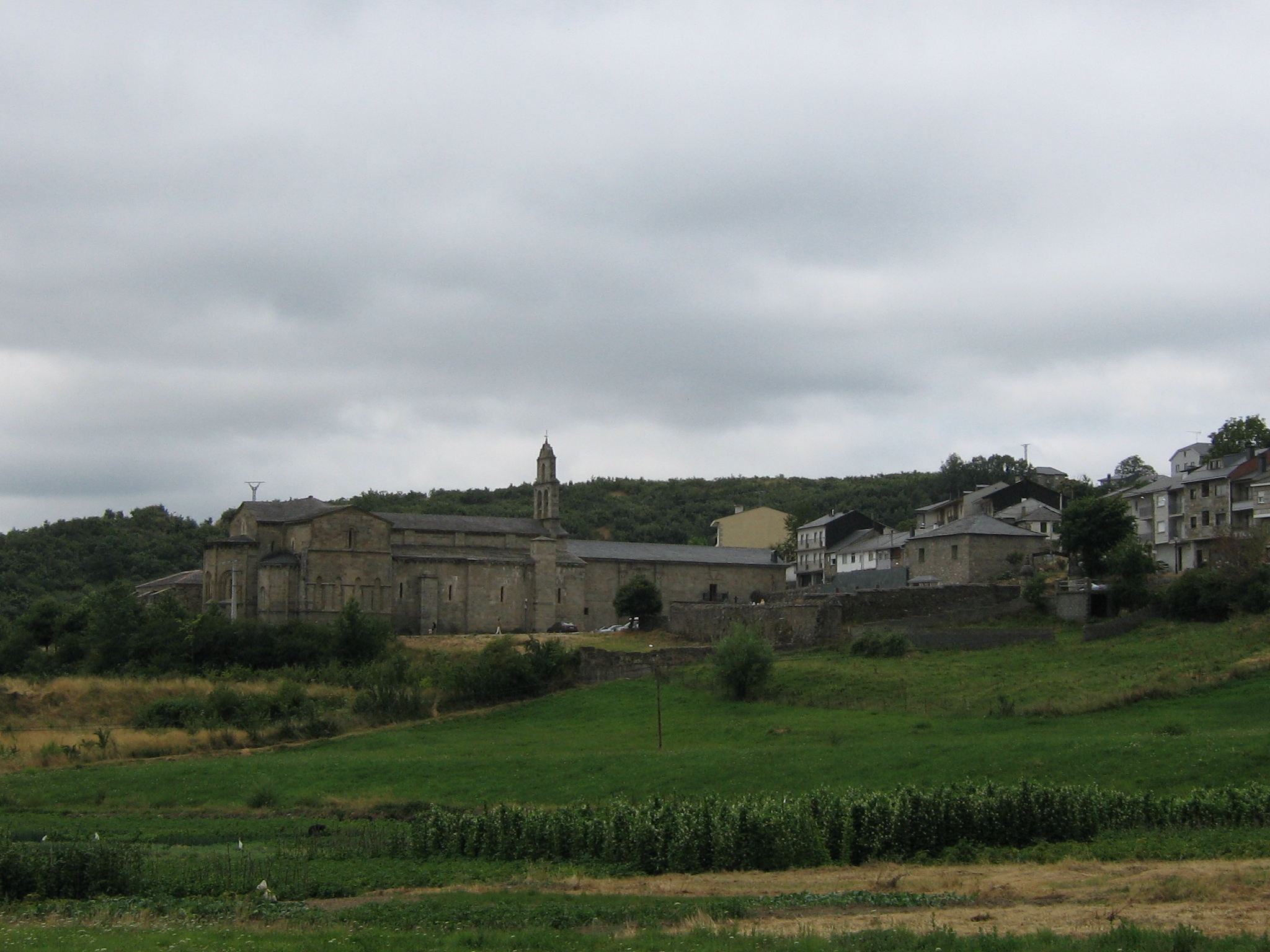 Blick auf das Kloster San Martín de Castañeda.